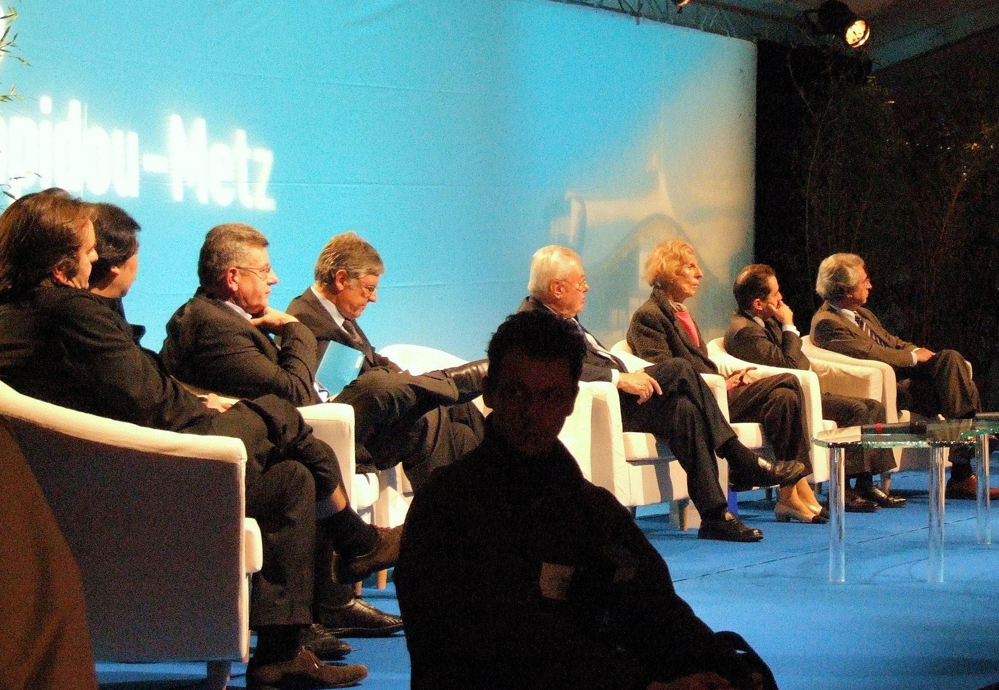 Centre Pompidou-Metz - Pose de la première pierre - Discours en présence de Madame Pompidou